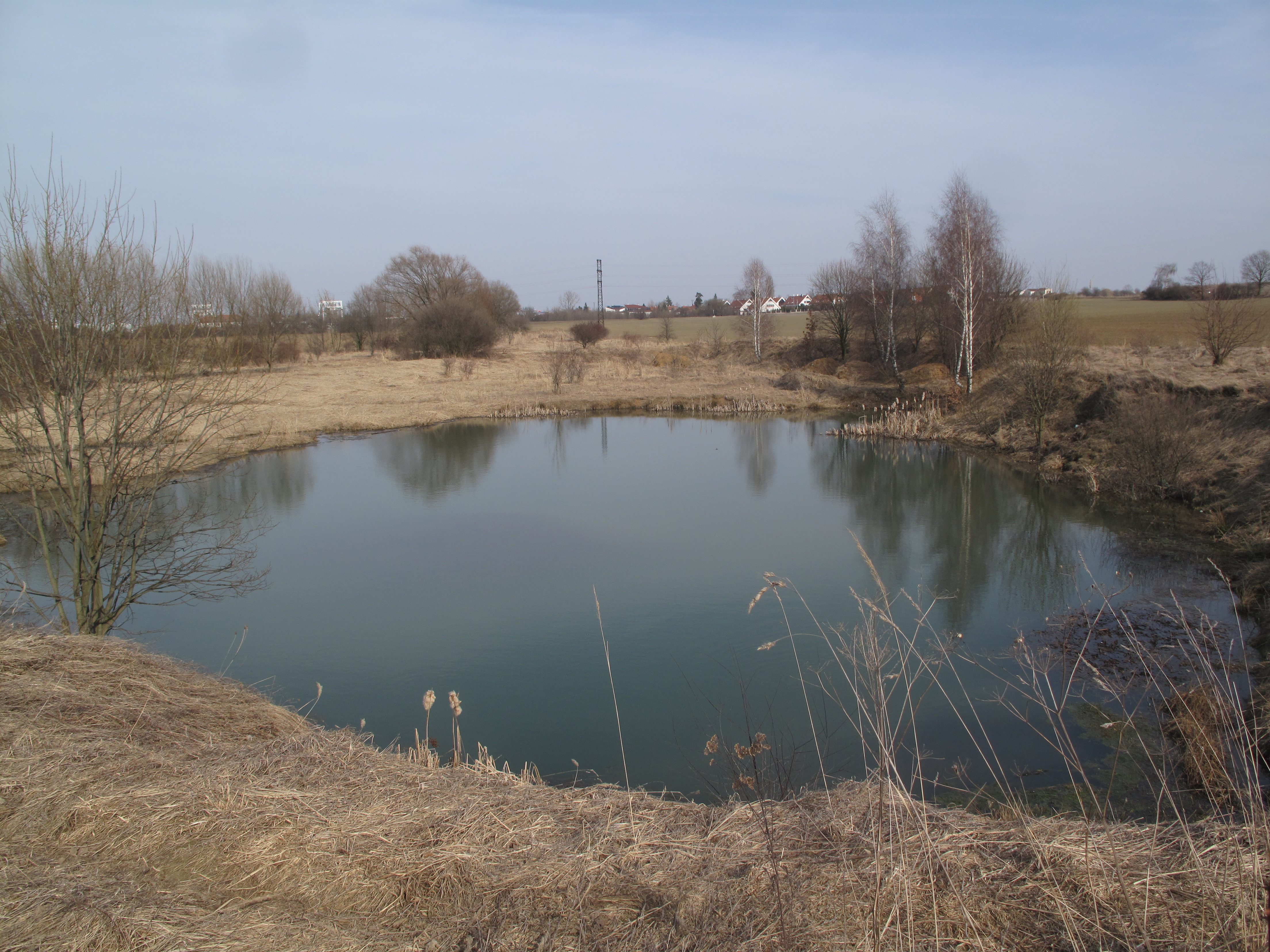 Dobrá Voda, vodní plocha